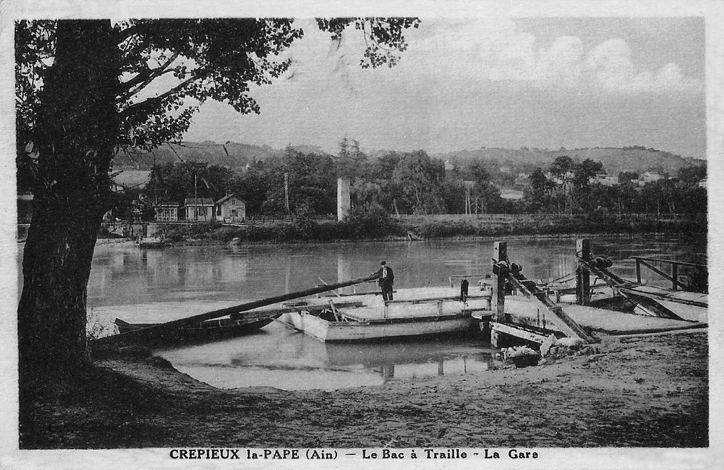 Le Rhône, avec en premier plan le bac à traille et au second plan la gare de Crépieux-la-Pape.